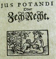 "Jus Potandi Oder ZechRecht", Titelblatt der deutschen Ausgabe des in London erschienenen Werkes von 1616, Rechte abgelaufen, Public Domain